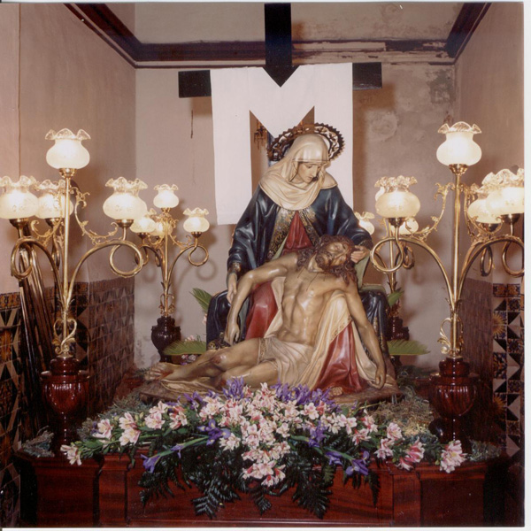 Paso de la Hermandad